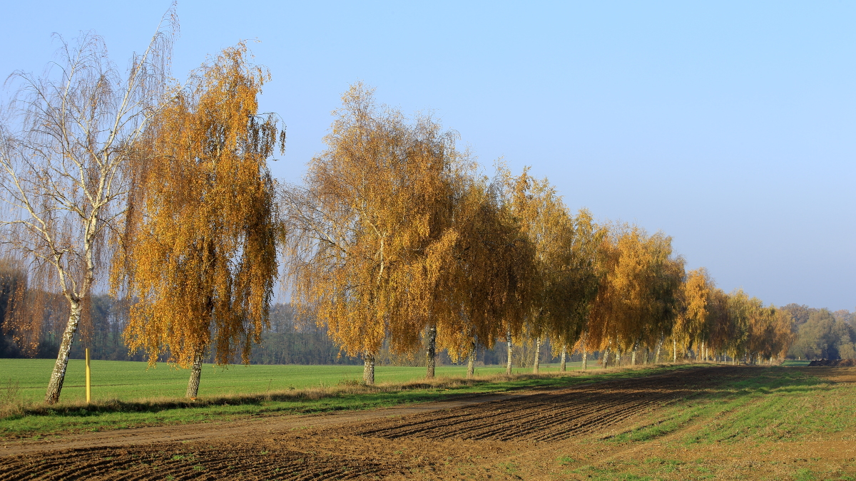 Feldrain mit herbstlichen Birken in Mecklenburg (zwischen Minzow und Groß Kelle)